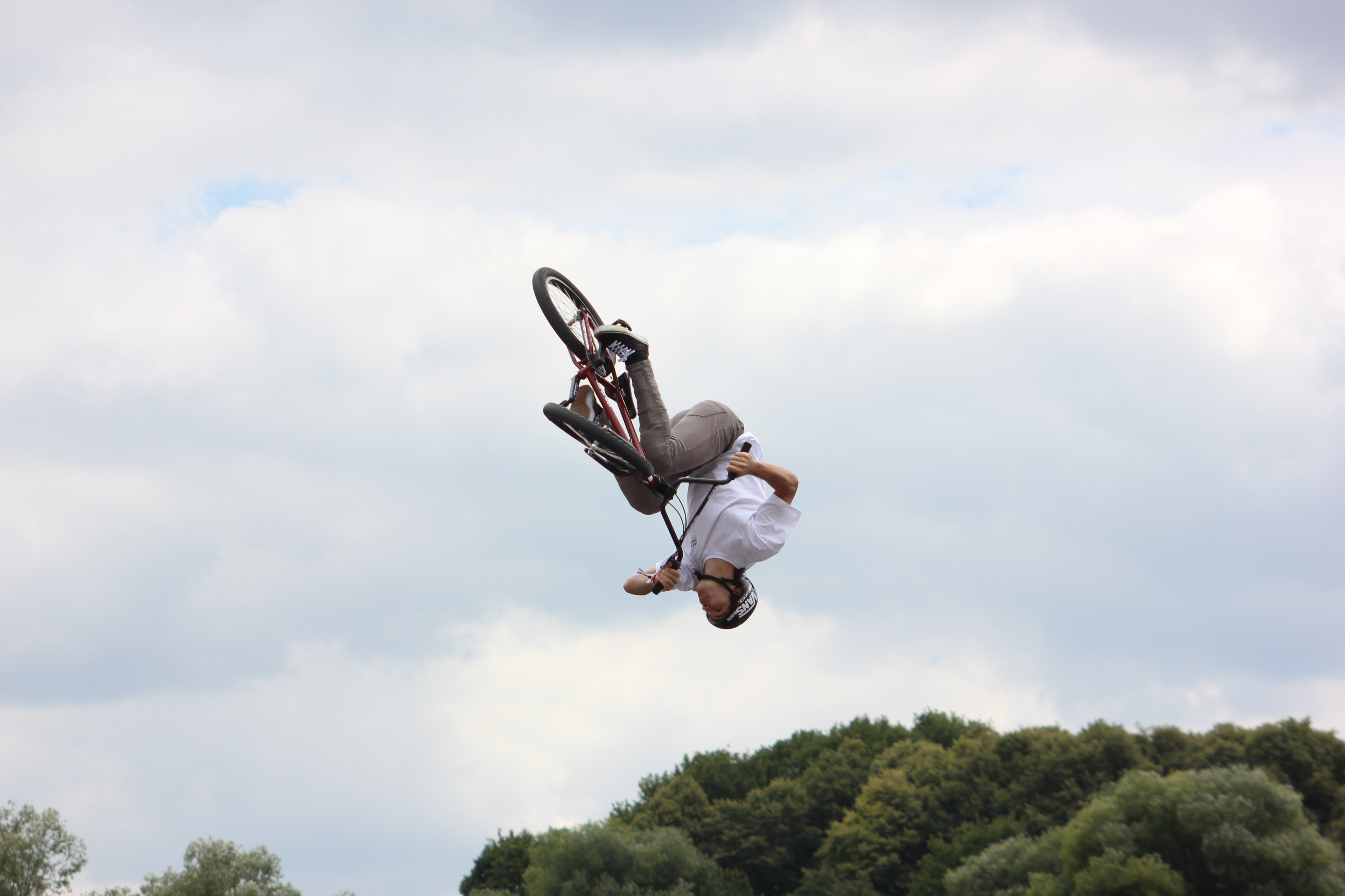 Munich Maxh Festival 2018. BMX Freestyler. BMX Park Final